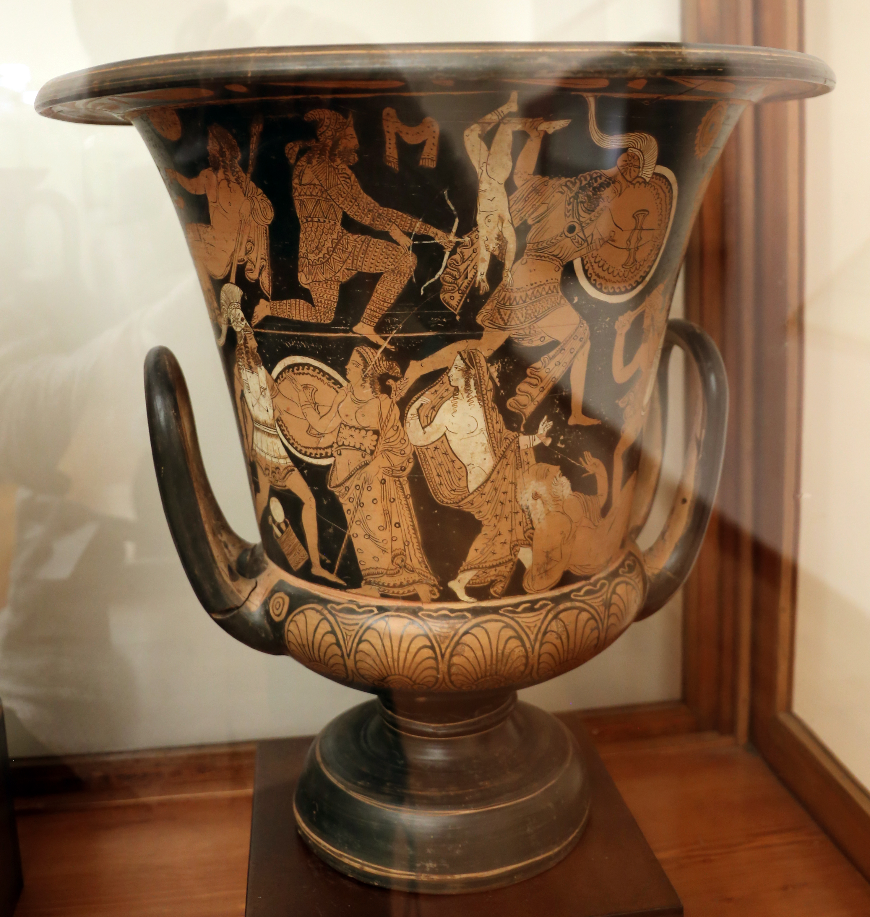 Museo nazionale etrusco di Villa Giulia This is a photo of a monument which is part of cultural heritage of Italy.